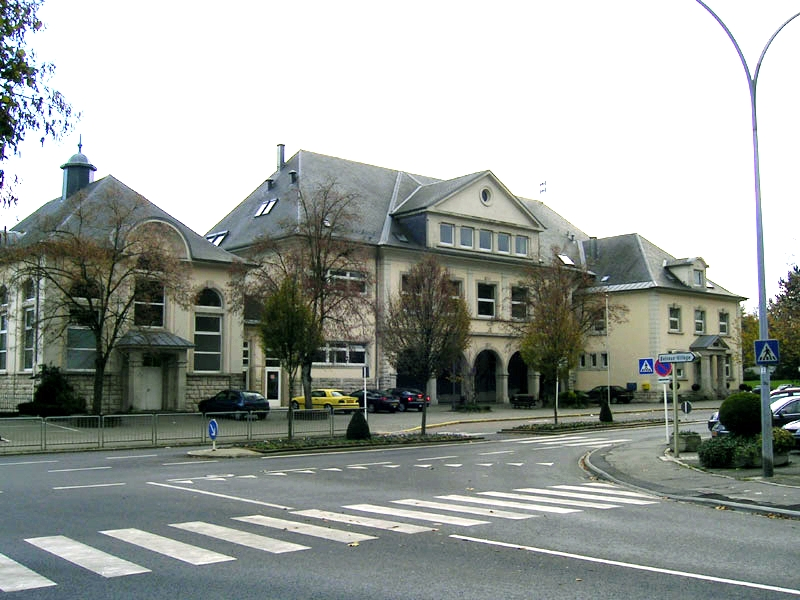 Primärschoul Bieles